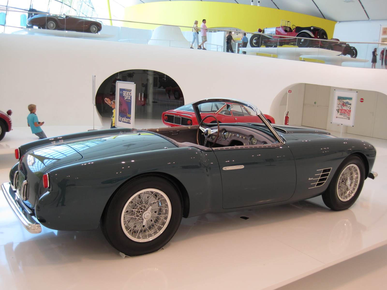 Automobiles in Enzo Ferrari Museum in Modène - Maserati A6G/54 2000 - Spider Zagato - 6 cylindres - 1955